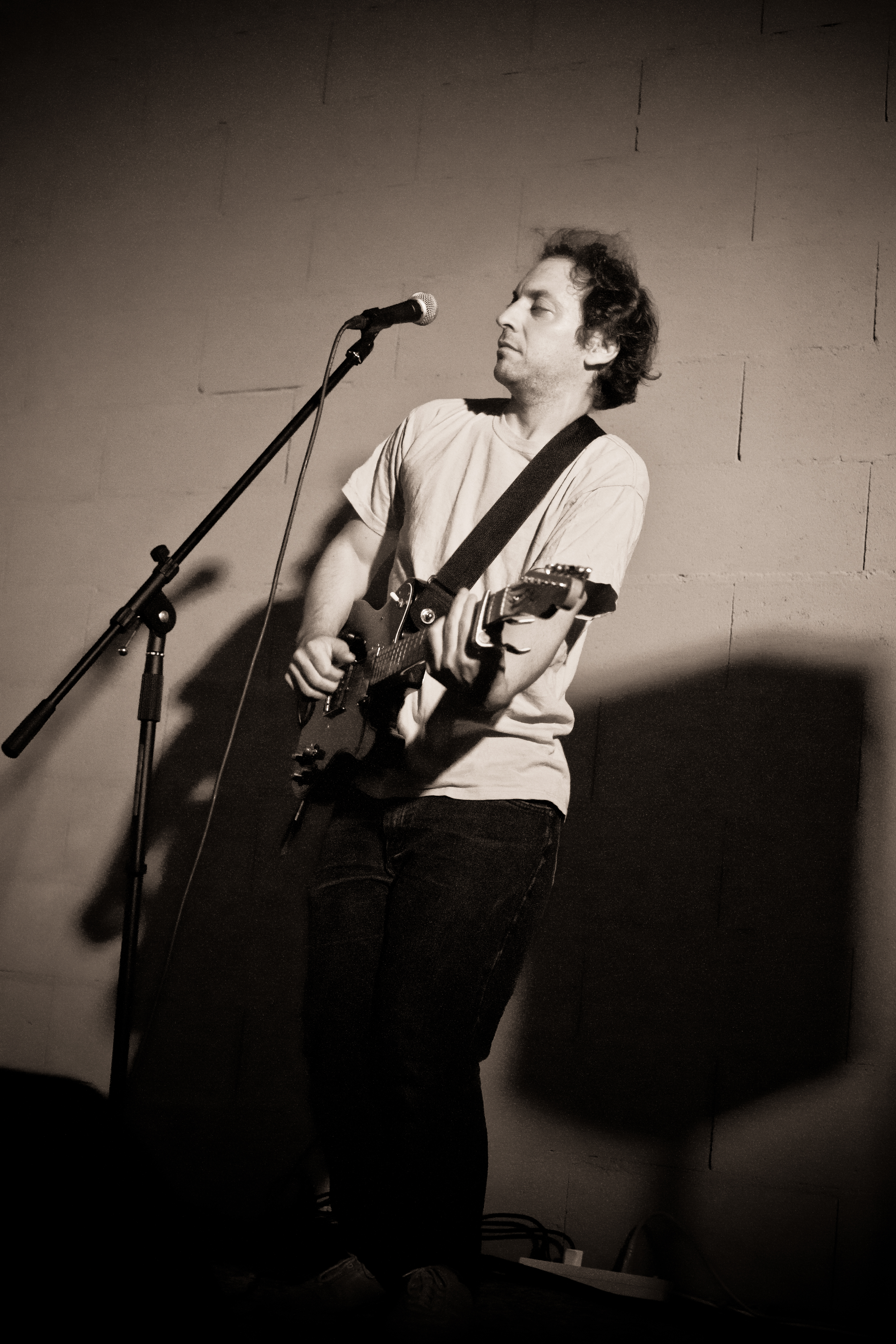 Mathieu Boogaerts à La Datcha (Lausanne) le 28 septembre 2011.